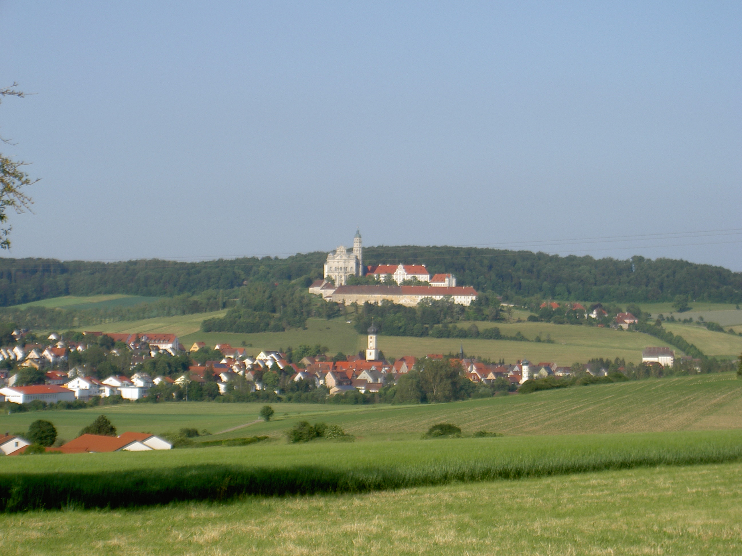 Neresheim